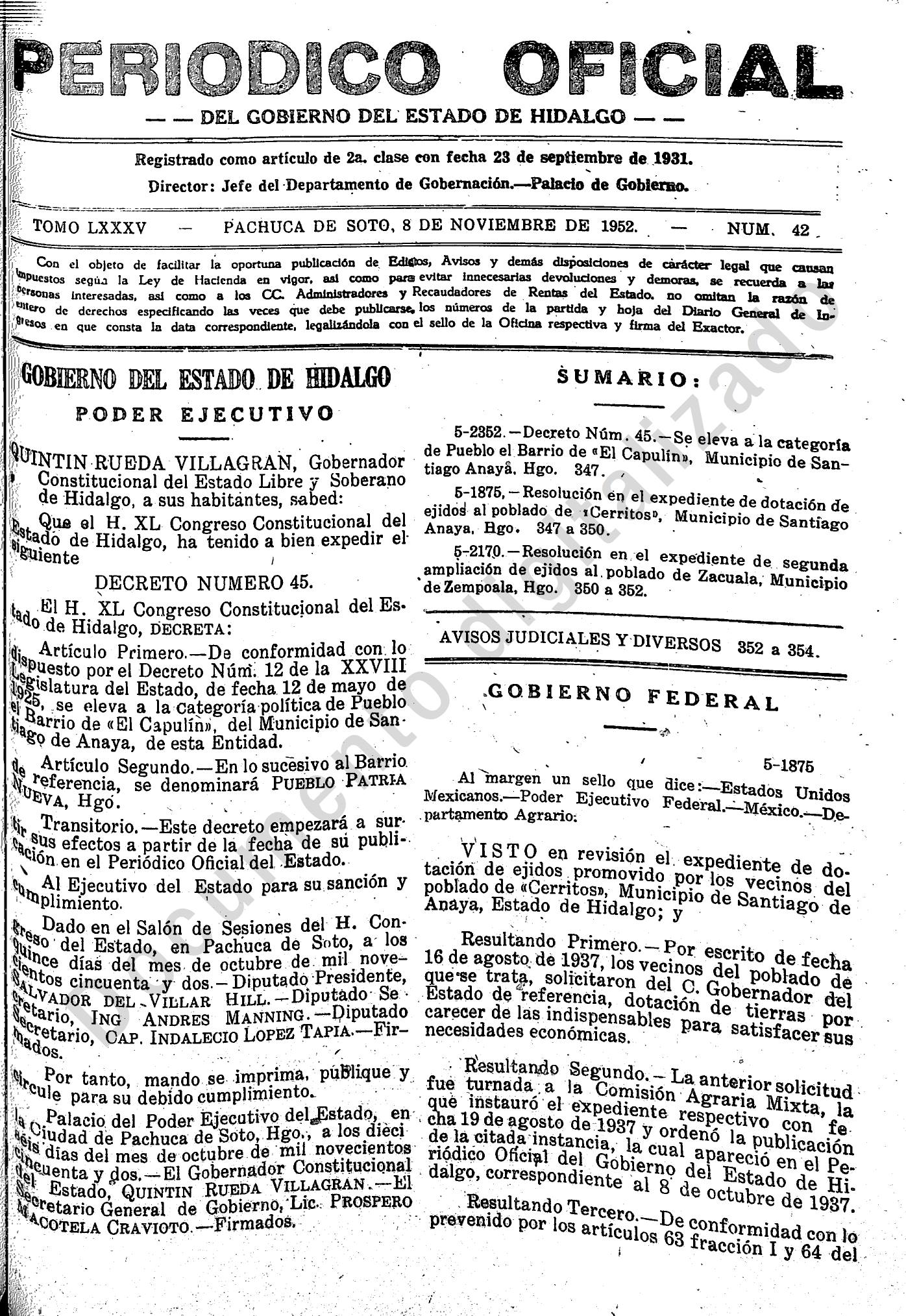 Periodico oficial Estado de Hidalgo 8 de noviembre de 1952